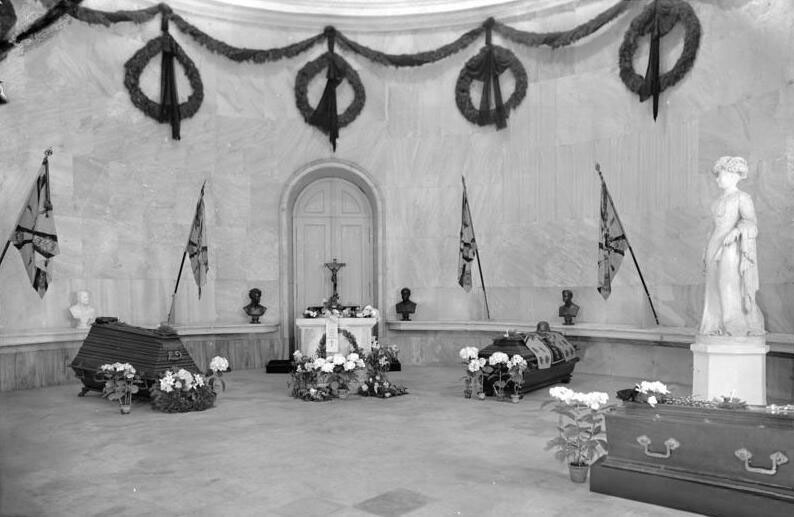 Potsdam.- Sanssouci, Antikentempel